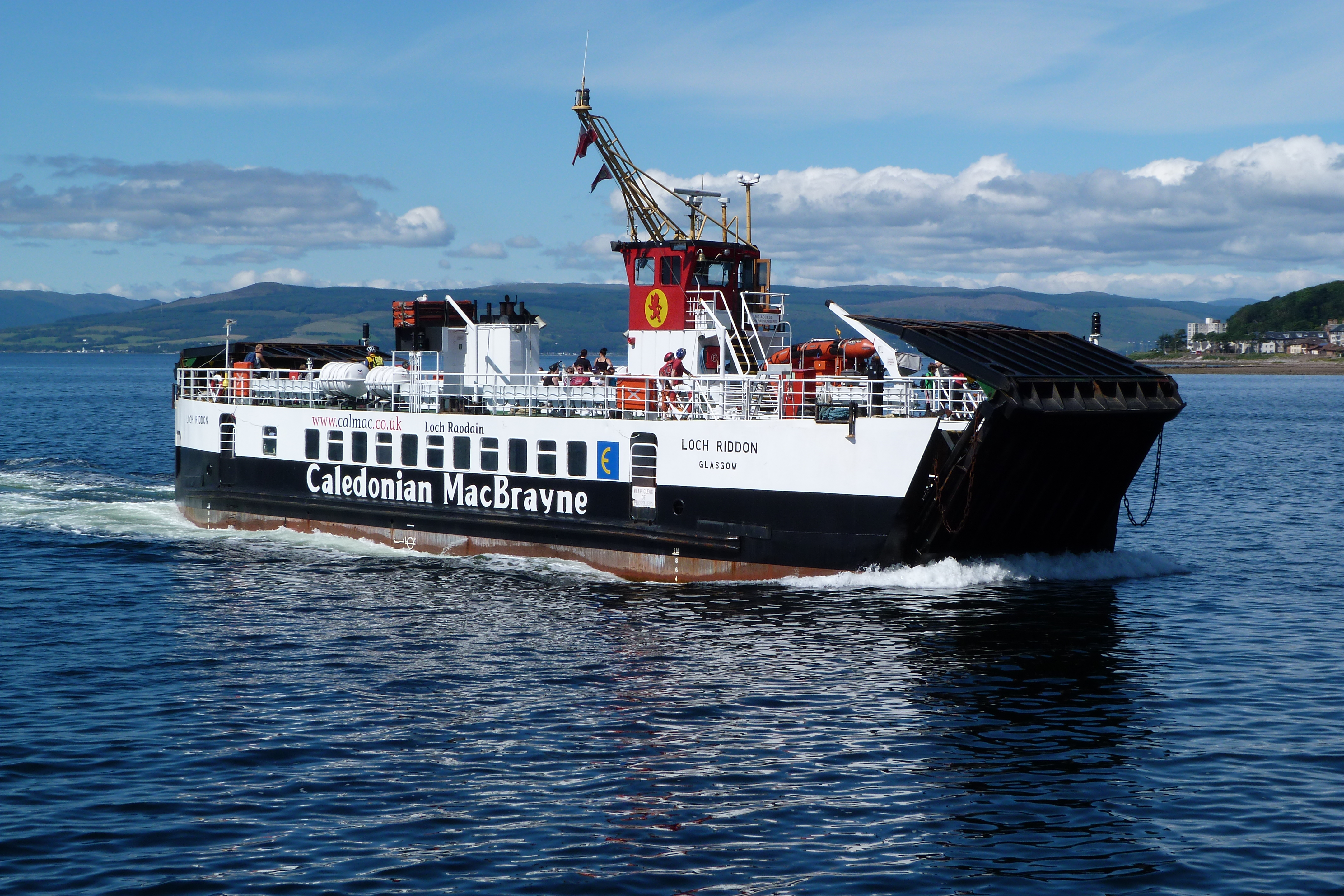 Caledonian MacBrayne Ferry.